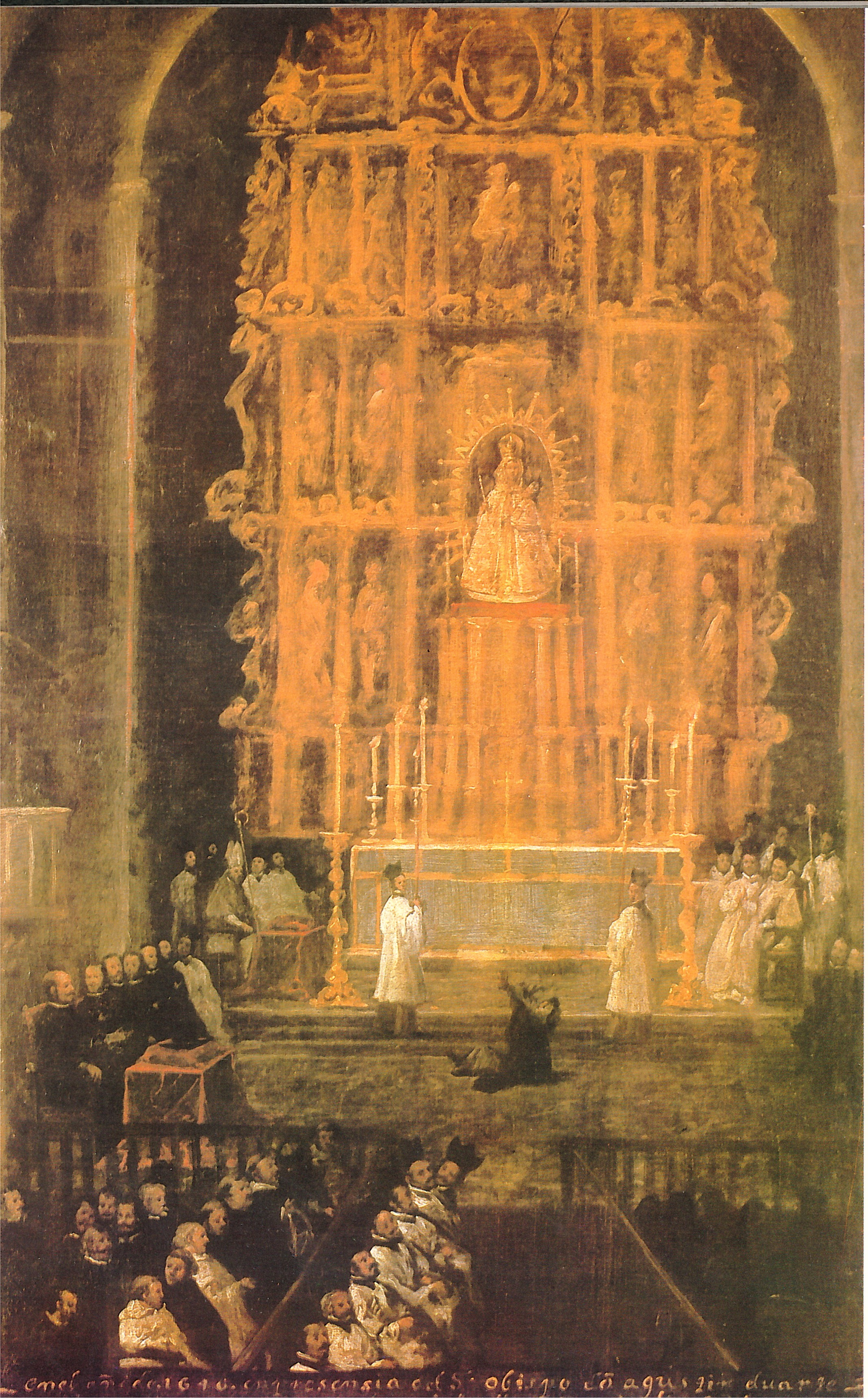 Vargas, José María; Cevallos García, Gabriel y otros investigadores. (1985). "Historia del Arte Ecuatoriano Tomo 2". Salvat Editores S.A. Barcelona, España – Quito, Ecuador. Consultado y compartido por J. Javier G. A.